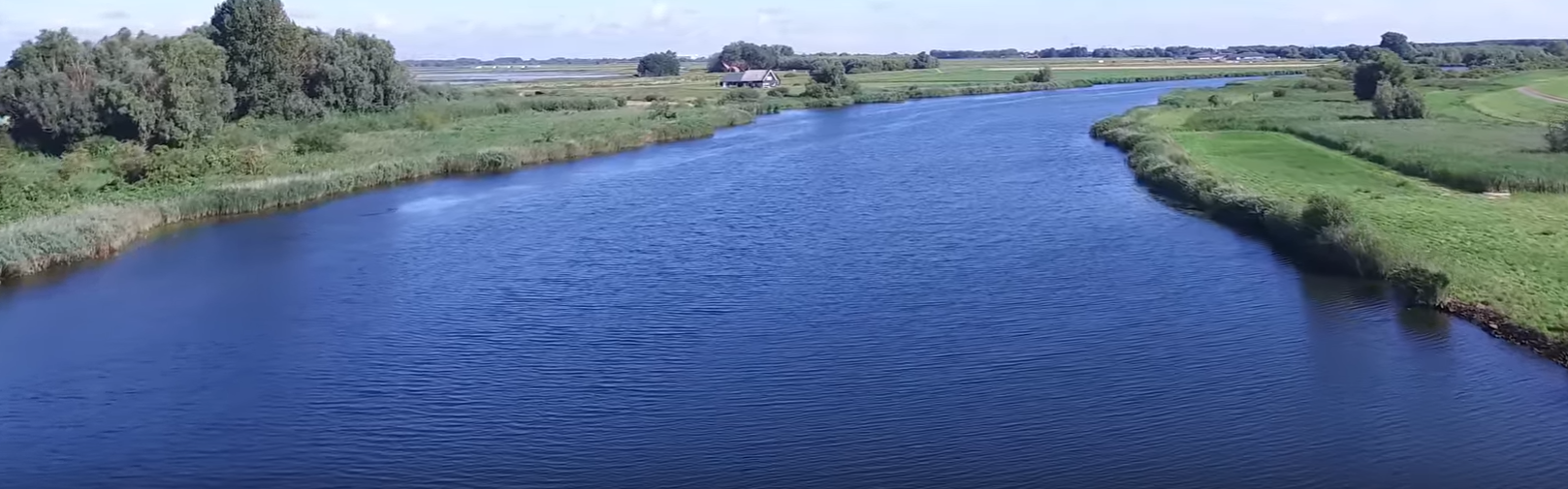 Het Gat van de Noorderklip